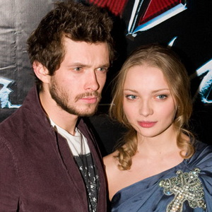 Григорий Добрыгин и Екатерина Вилкова на премьере фильма «Чёрная молния» в киноцентре «Октябрь» 21 декабря 2009 года